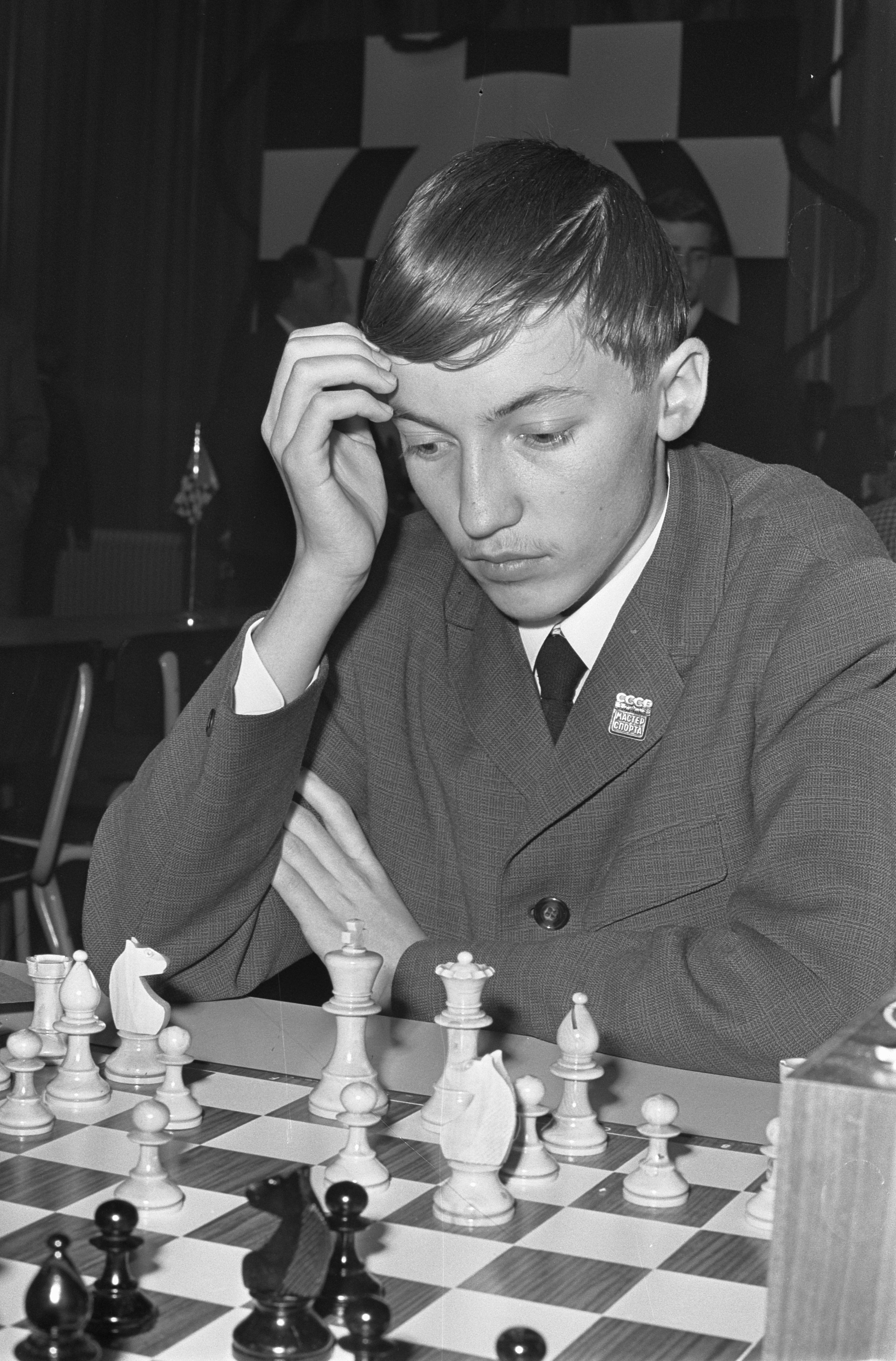 Collectie / Archief : Fotocollectie Anefo Reportage / Serie : [ onbekend ] Beschrijving : Zesde Niemeyer Jeugdschaaktoernooi te Groningen. Antoni Karpov (Rusland), Datum : 27 december 1967 Locatie : Groningen, Sovjet-Unie Trefwoorden : schaken, sport Persoonsnaam : Karpov Antoni Fotograaf : Nijs, Jac. de / Anefo Auteursrechthebbende : Nationaal Archief Materiaalsoort : Negatief (zwart/wit) Nummer archiefinventaris : bekijk toegang 2.24.01.05 Bestanddeelnummer : 920-9514